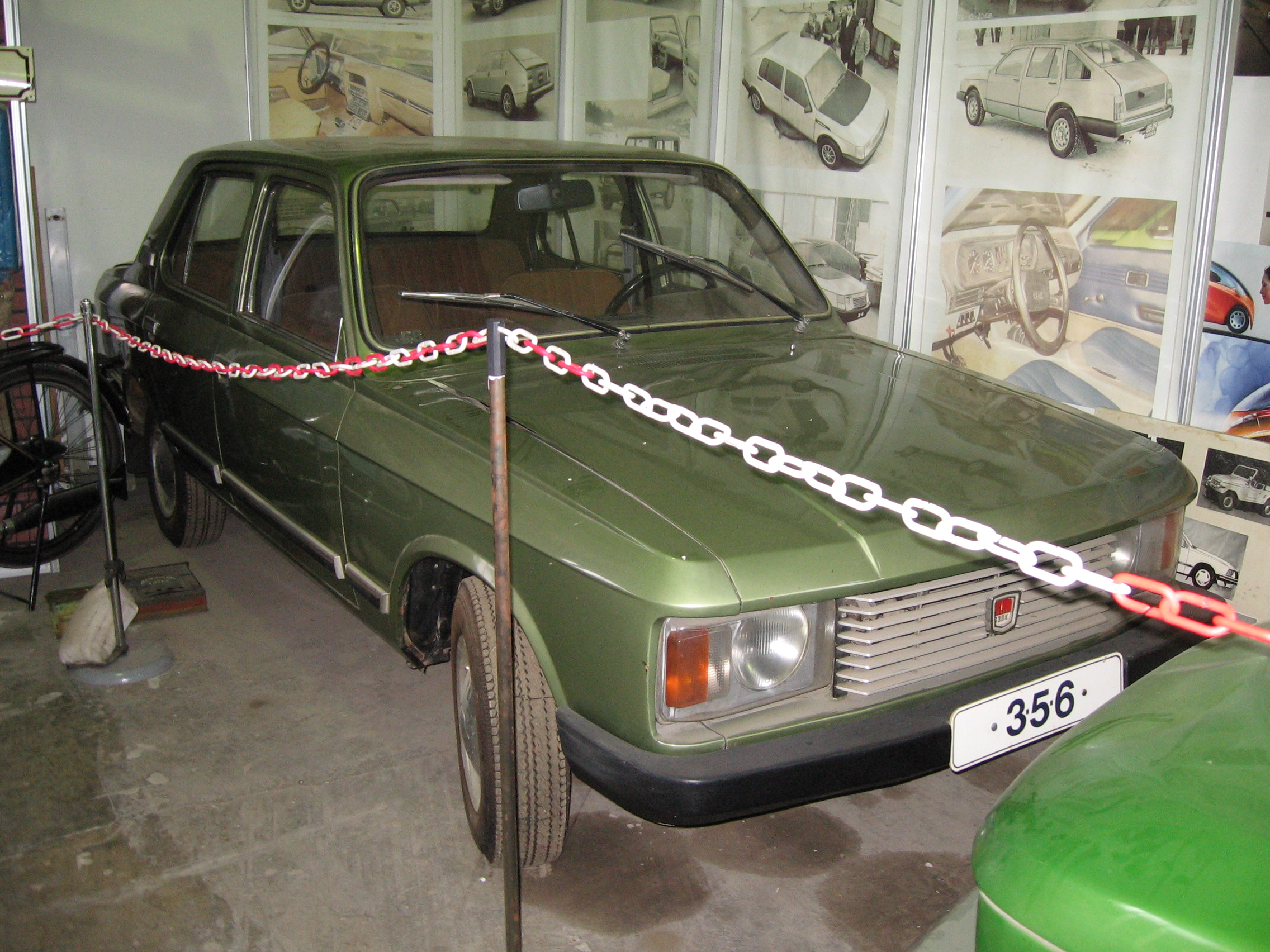 Moskvich-3-5-6. Protype